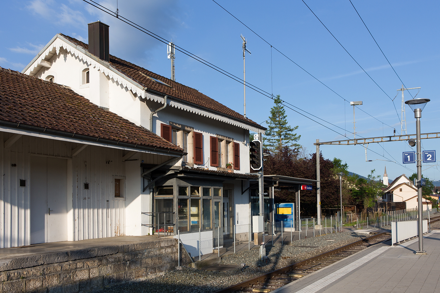 Bahnhof von Courfaivre (JU)